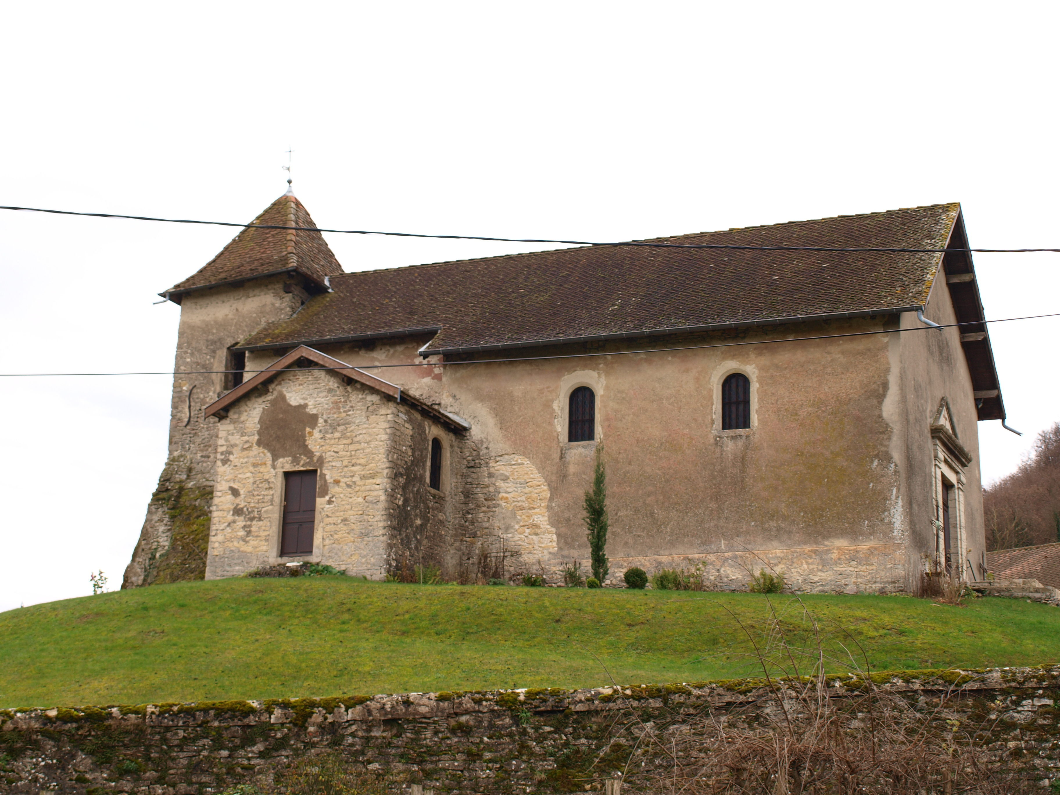 Nivolas-Vermelle (Isère, France); l'église Saint-Blaise de Vermelle.